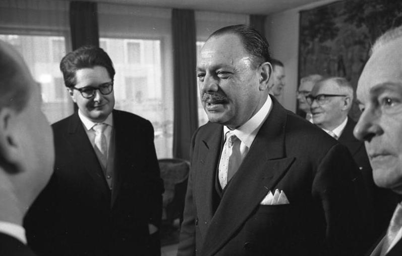 Pakistanischer Staatspräsident Ayoub Khan zu Besuch in Deutschland Essen mit dem bayerischen Ministerpräsidenten Ehard im Hotel Continental (München)